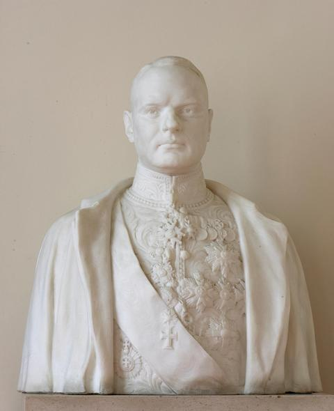 Buste van de Nederlandse Politicus Maurits van Vollehoven. Het staat in de Belgische Senaatsgebouwen.